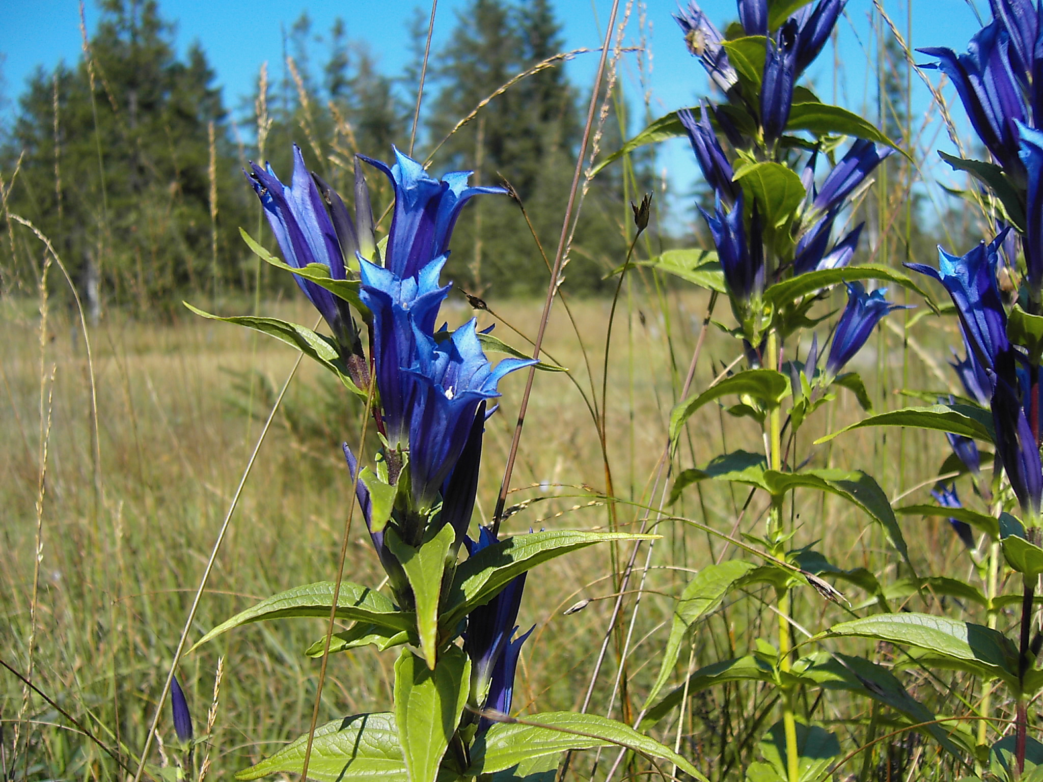 Schwalbenwurz-Enzian (Gentiana asclepiadea) im Tölzer Land